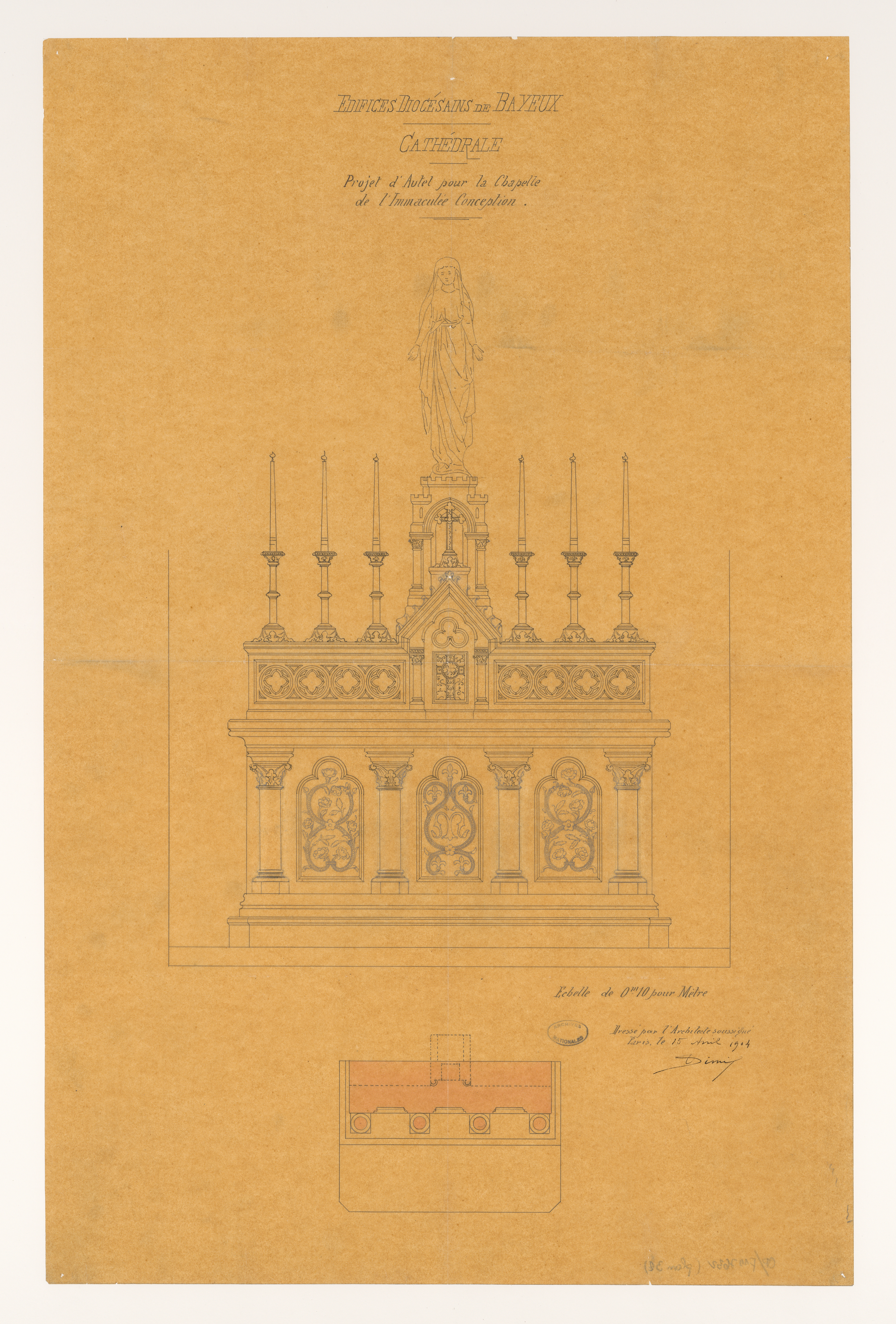 Projet d'autel pour la chapelle de l'Immaculée Conception (avec détail de la décoration). Plan issu des dossiers de travaux de restauration des cathédrales (1802-1912), conservés aux Archives nationales (inventaire et autres documents numérisés consultables en ligne).